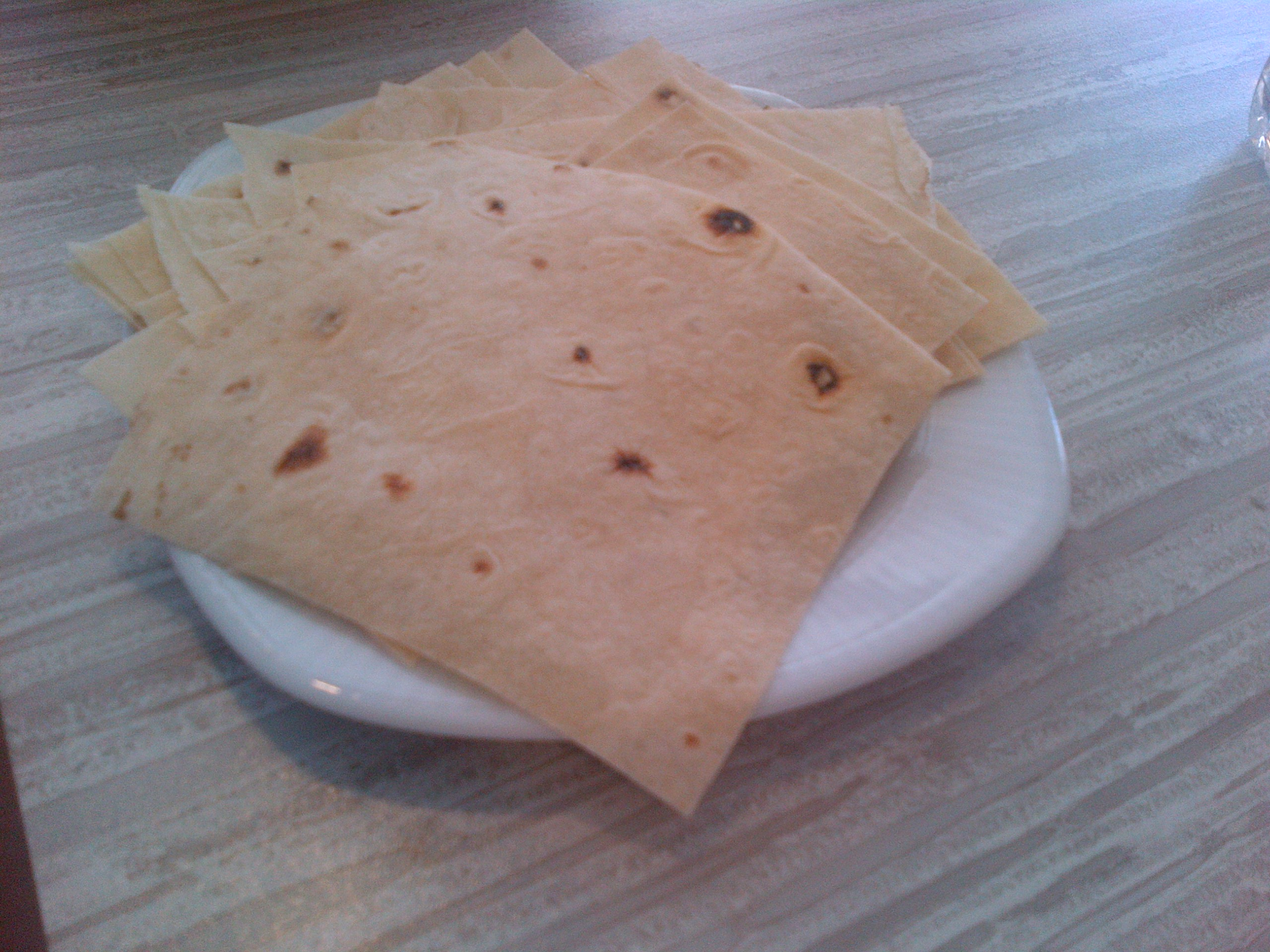 Yufka o sac ekmeği (pa de plantxa) de la cuina tuırca.